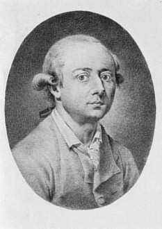 Johann Heinrich Wilhelm Tischbein